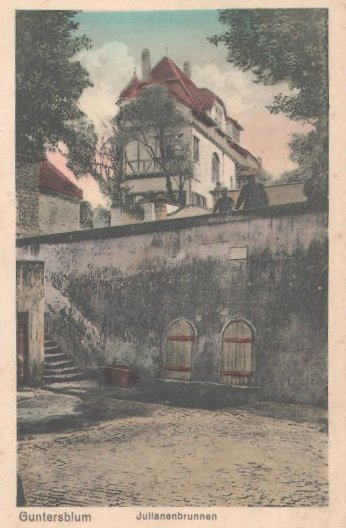 Der Guntersblumer Julianenbrunnen in Rheinhessen (Deutschland)